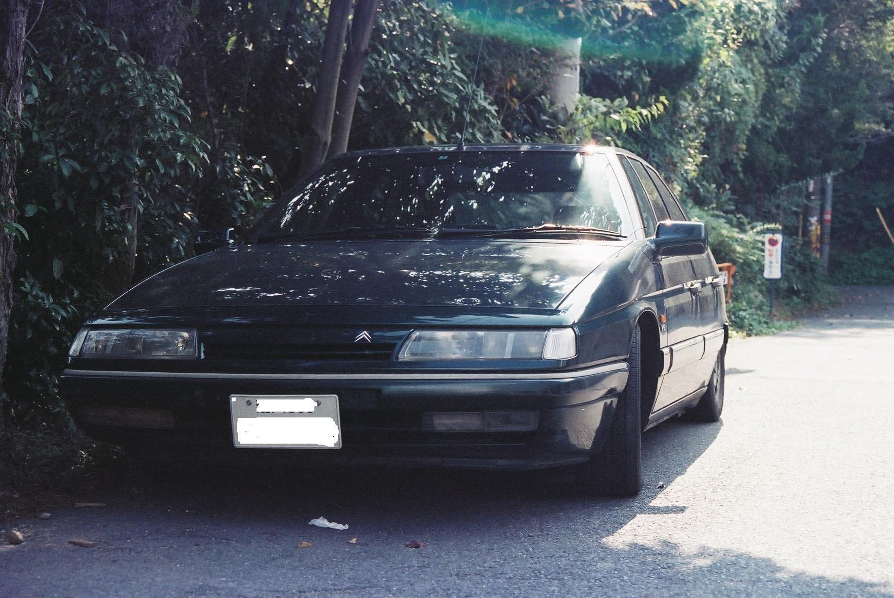 以前にも初期型ＸＭをＵＰしましたが、半切れの為差し替えます。